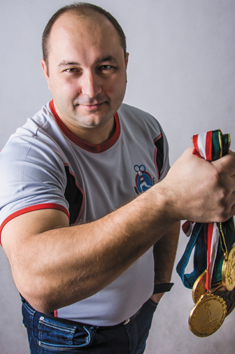 Алексей Петров. Заслуженный мастер спорта. Олимпийский чемпион (Атланта, 1996), бронзовый призер Игр (Сидней, 2000) по тяжелой атлетике, многократный чемпион и рекордсмен мира, Европы, России. Фотография из серии «Лица эстафеты».